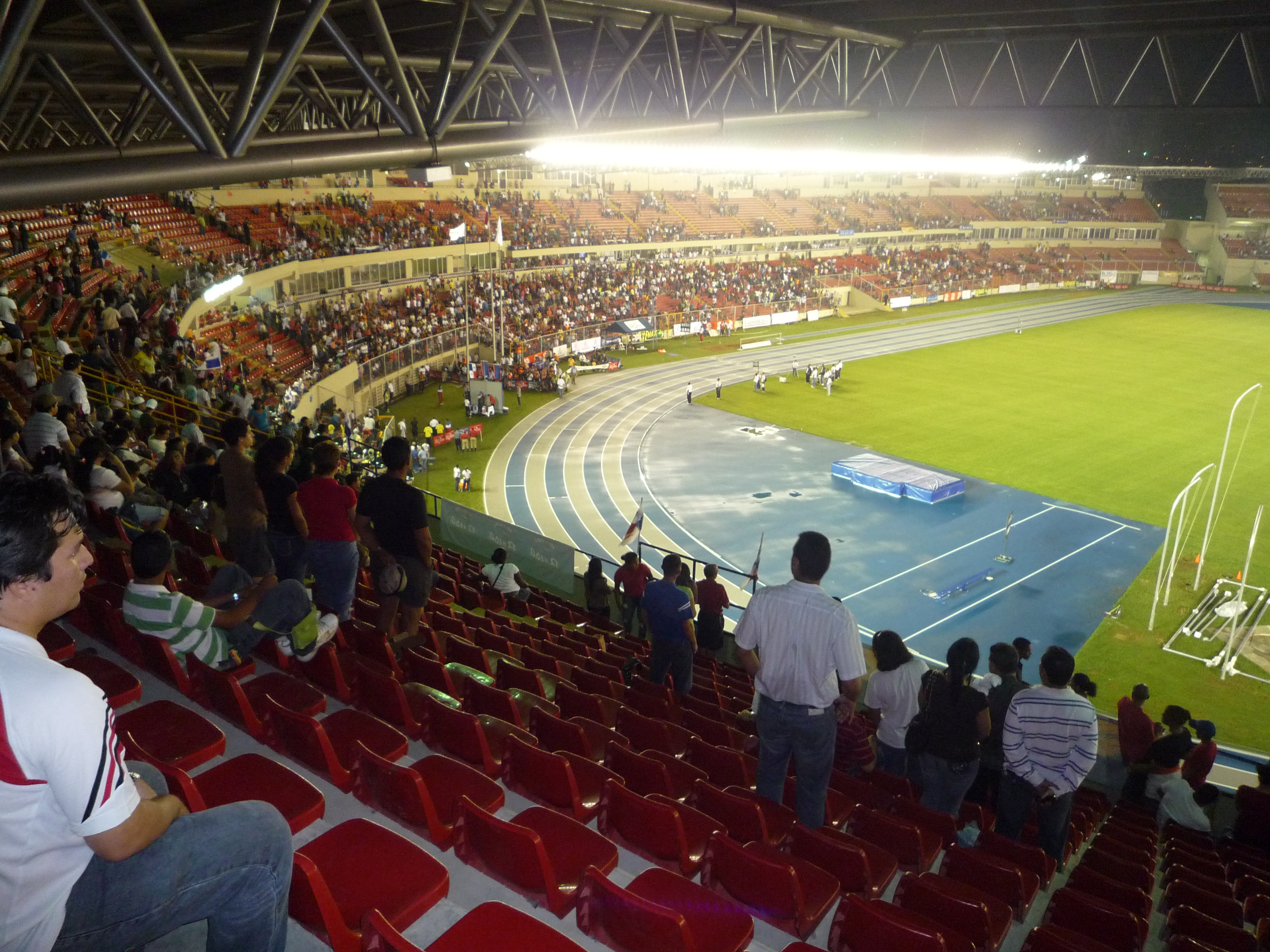 Estadio Rommel Ferández, ciudad de Panamá, Panamá.